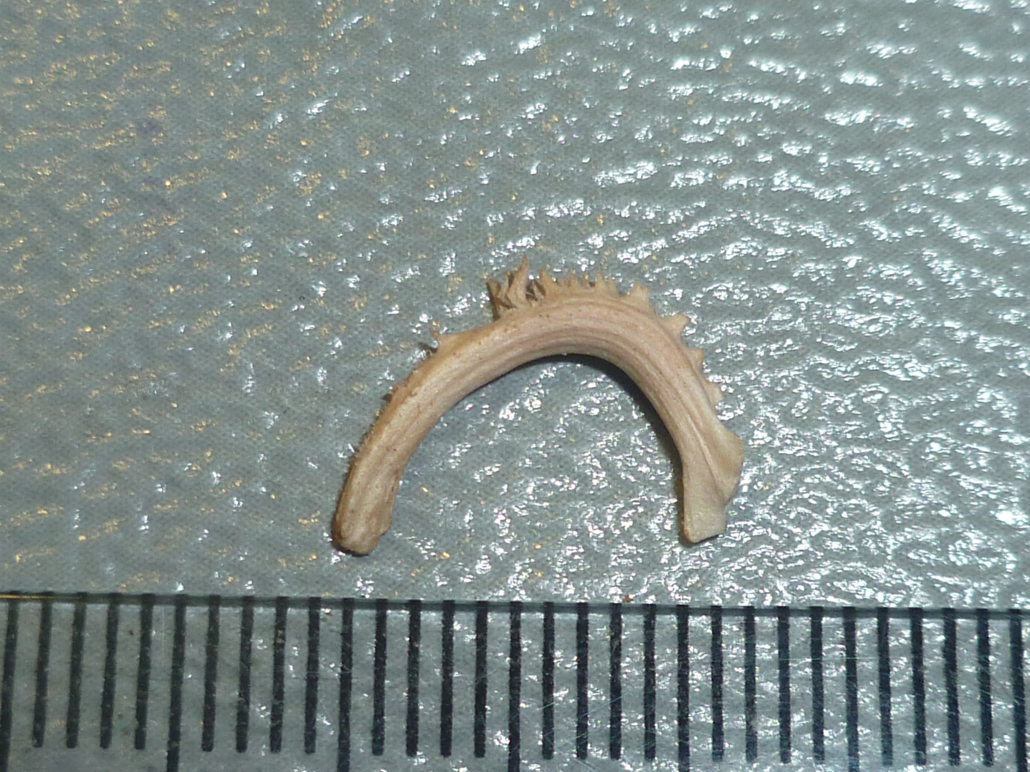 akène périphérique crochu de calendula officinalis